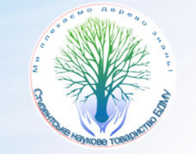 Студентське наукове товариство Буковинського державного медичного університету